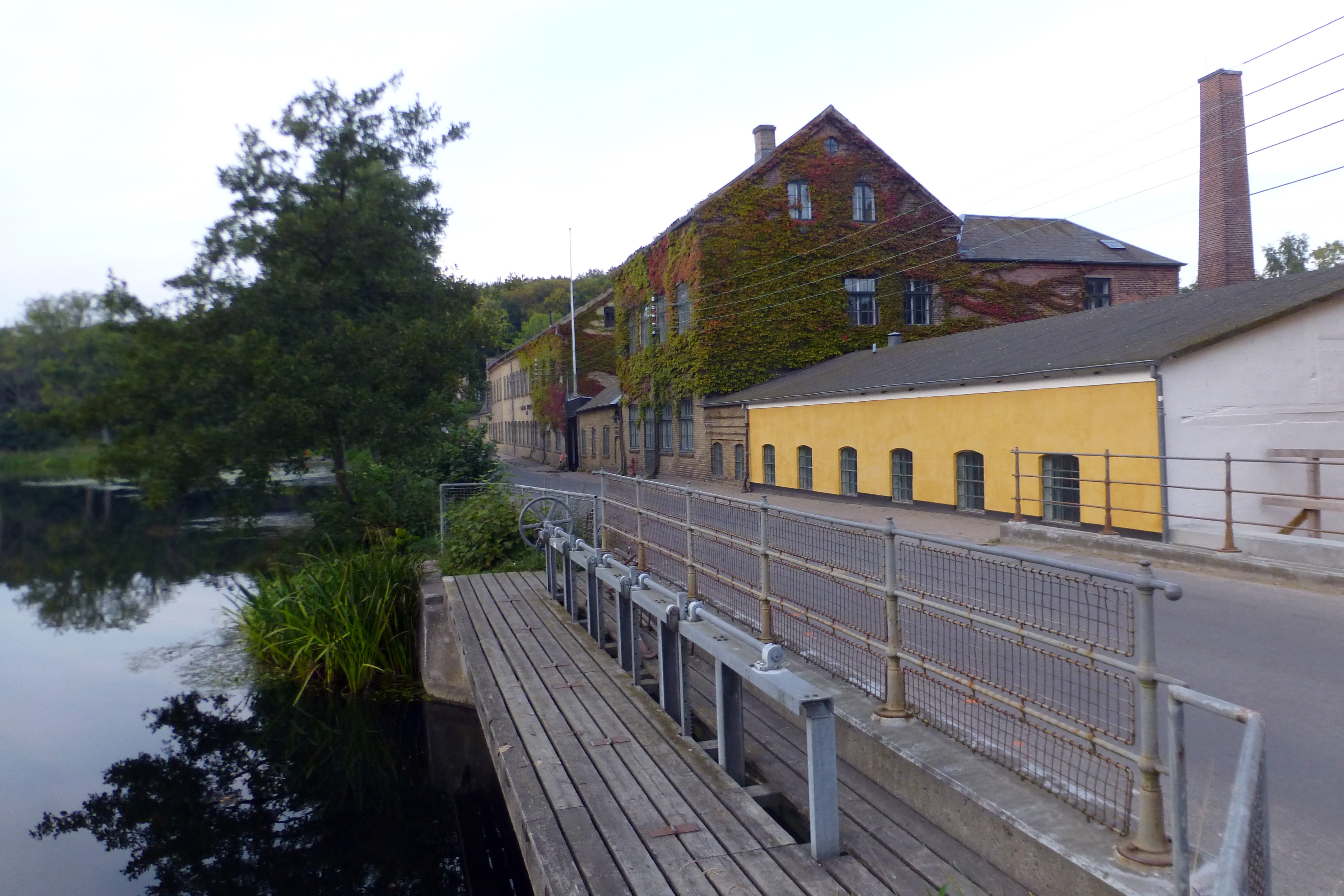 Raadvad fabrikker ved Mølleåen